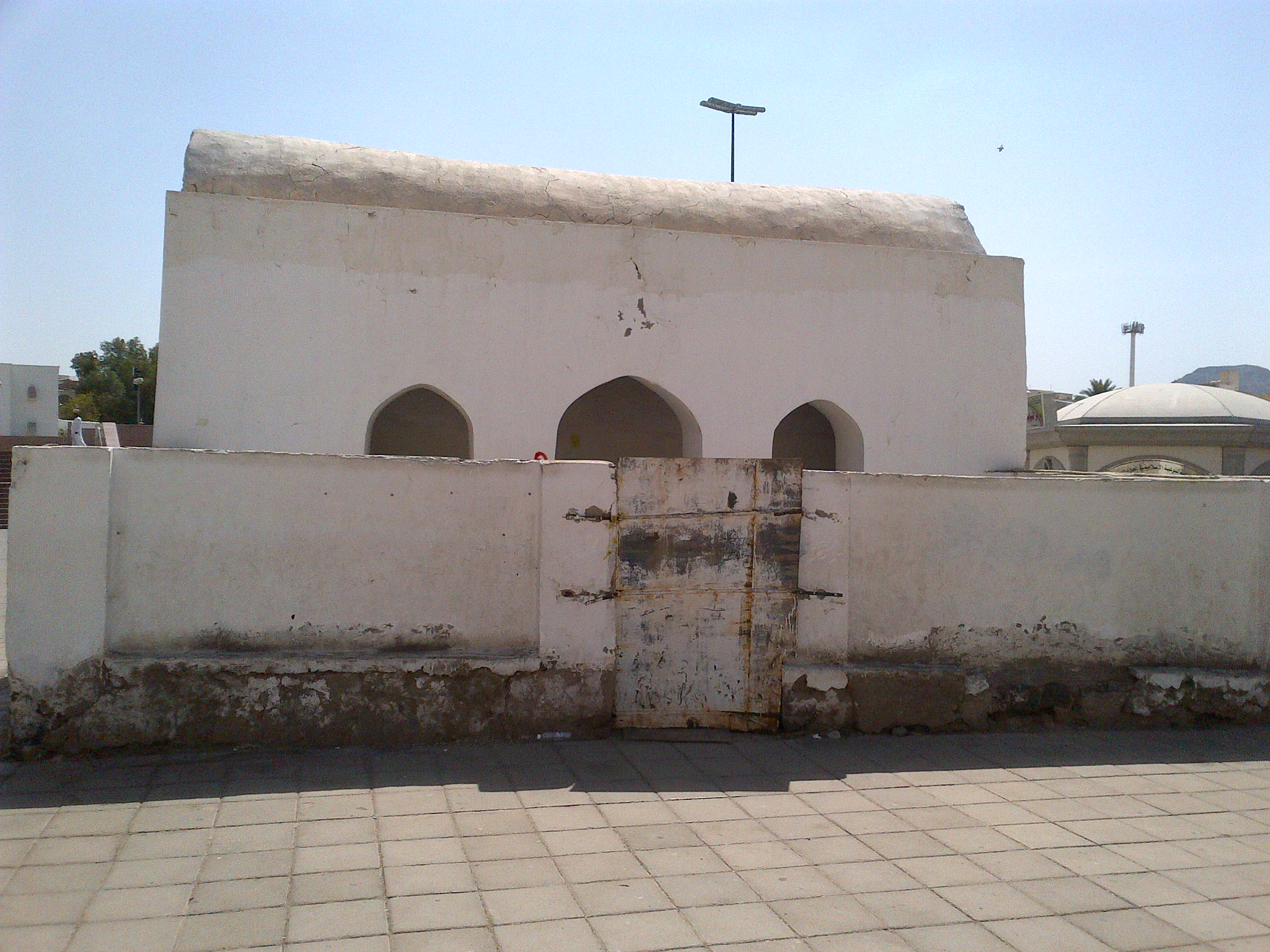 Salah satu masjid bagian dari Sab'u Masajid